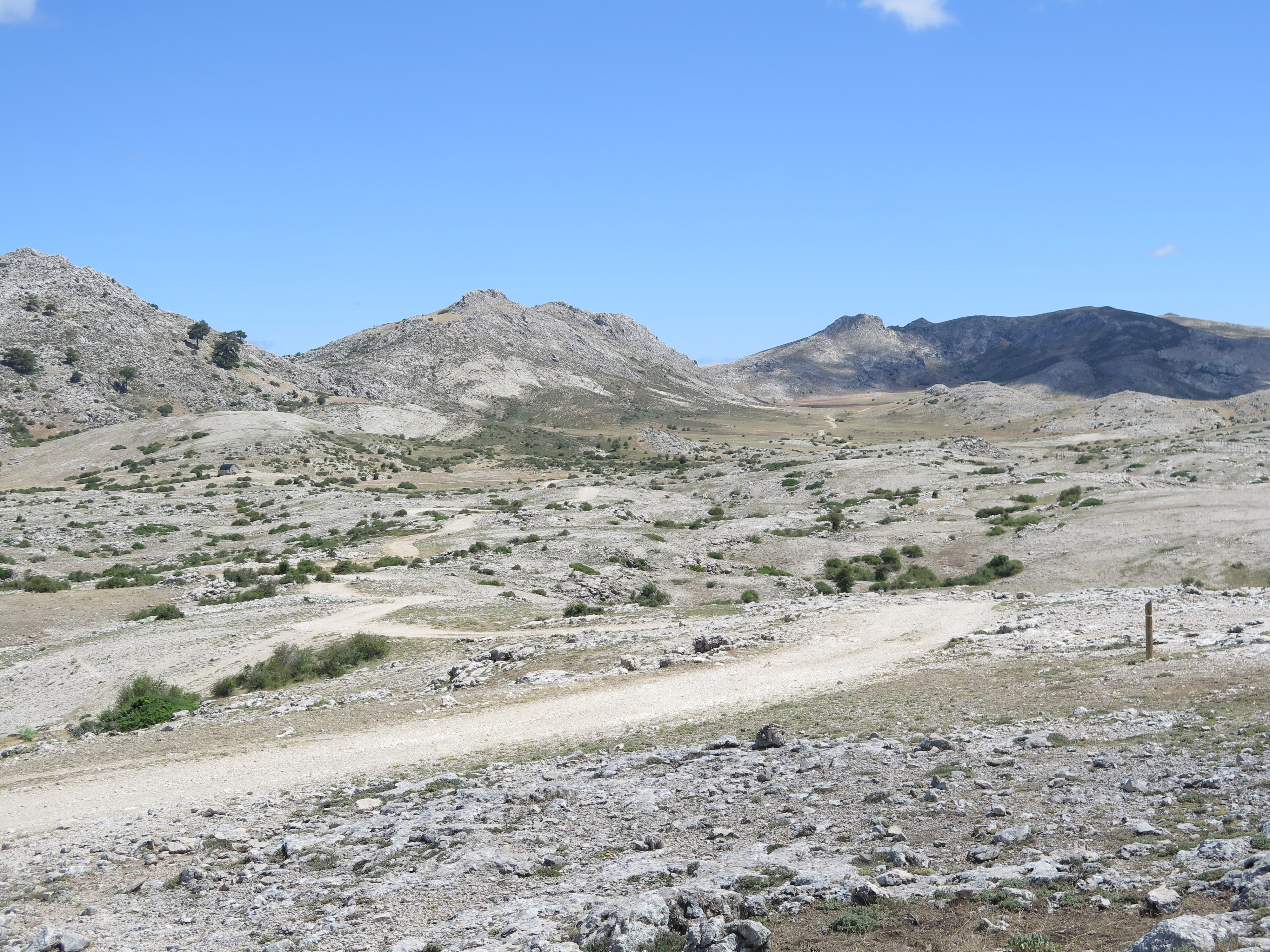 Sendero señalizado de una etapa del GR-247, que transcurre por los Campos de Hernán Perea.